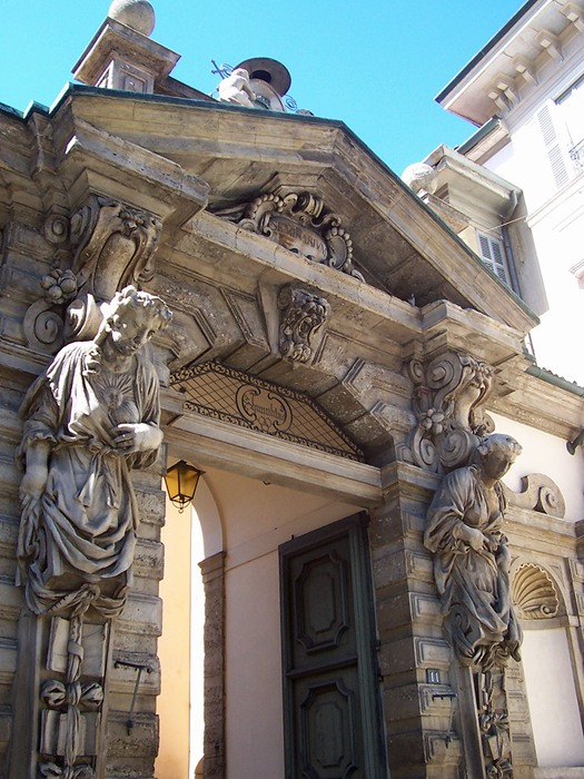 Milano - Ingresso al Seminario Arcivescovile in Corso Venezia